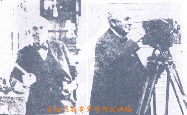 湯馬士．艾爾巴．愛迪生同埋佢發明嘅有聲電影放映機。